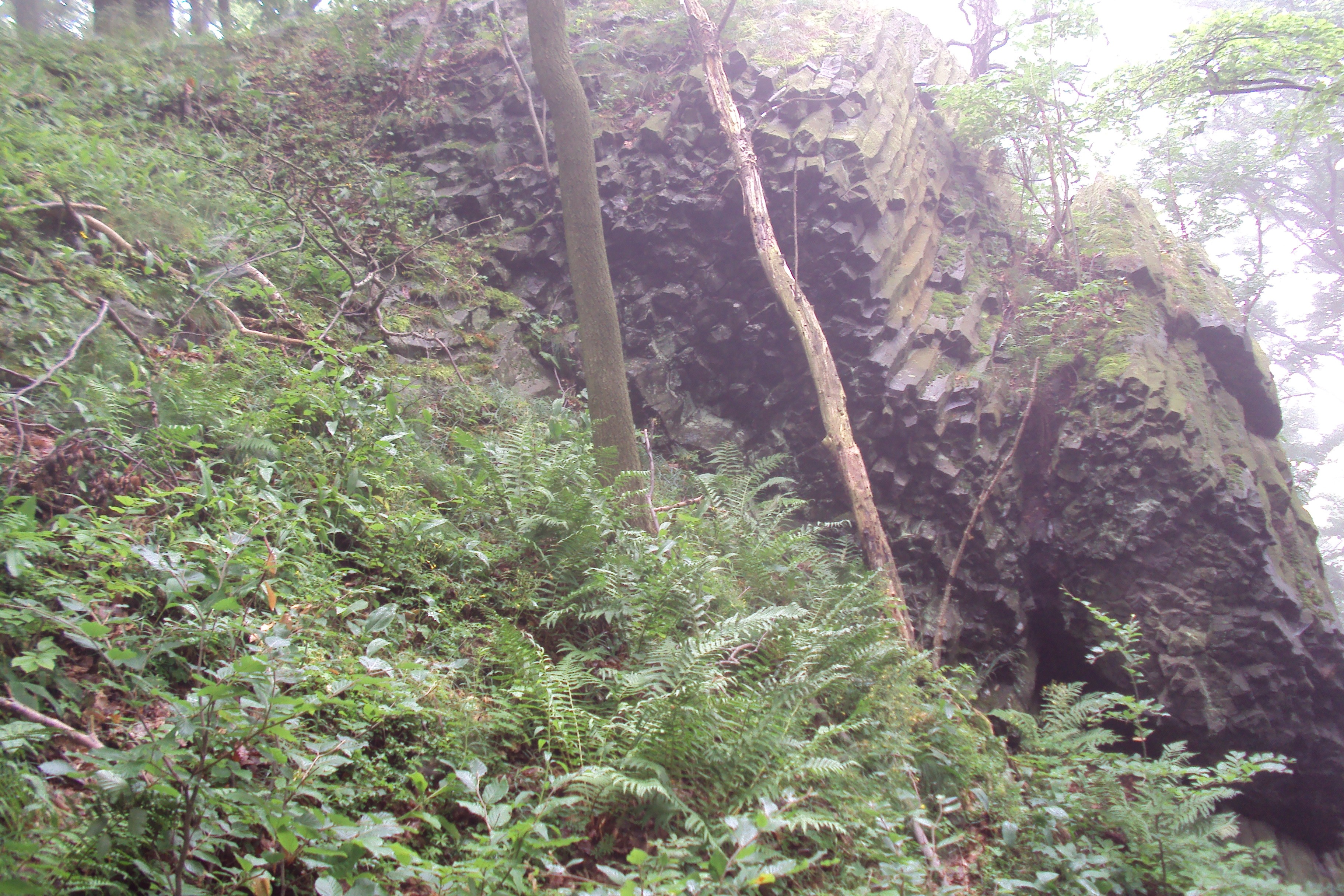 Skály pod vrcholem, pro mlhu jen detail